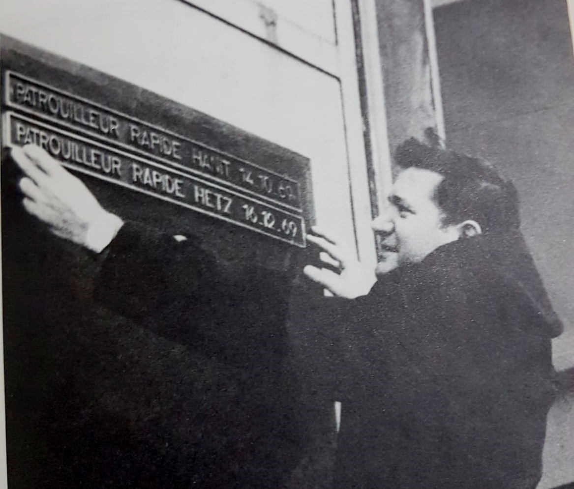 משה טבק מדביקה שלט לציון השקת אח"י חץ 16 בדצמבר 1969